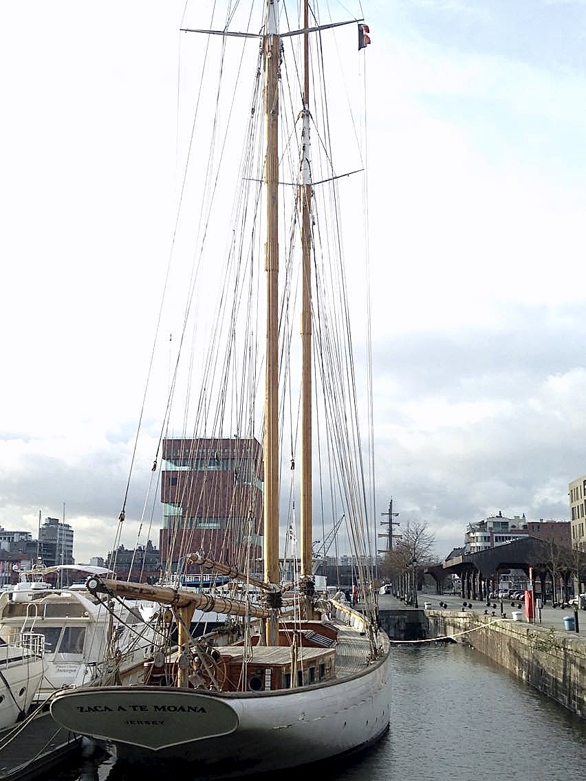 Photo de Zaca A Te Moana, Hiver 2017, Port d'Anvers